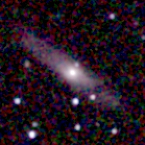 Galaxy NGC 13